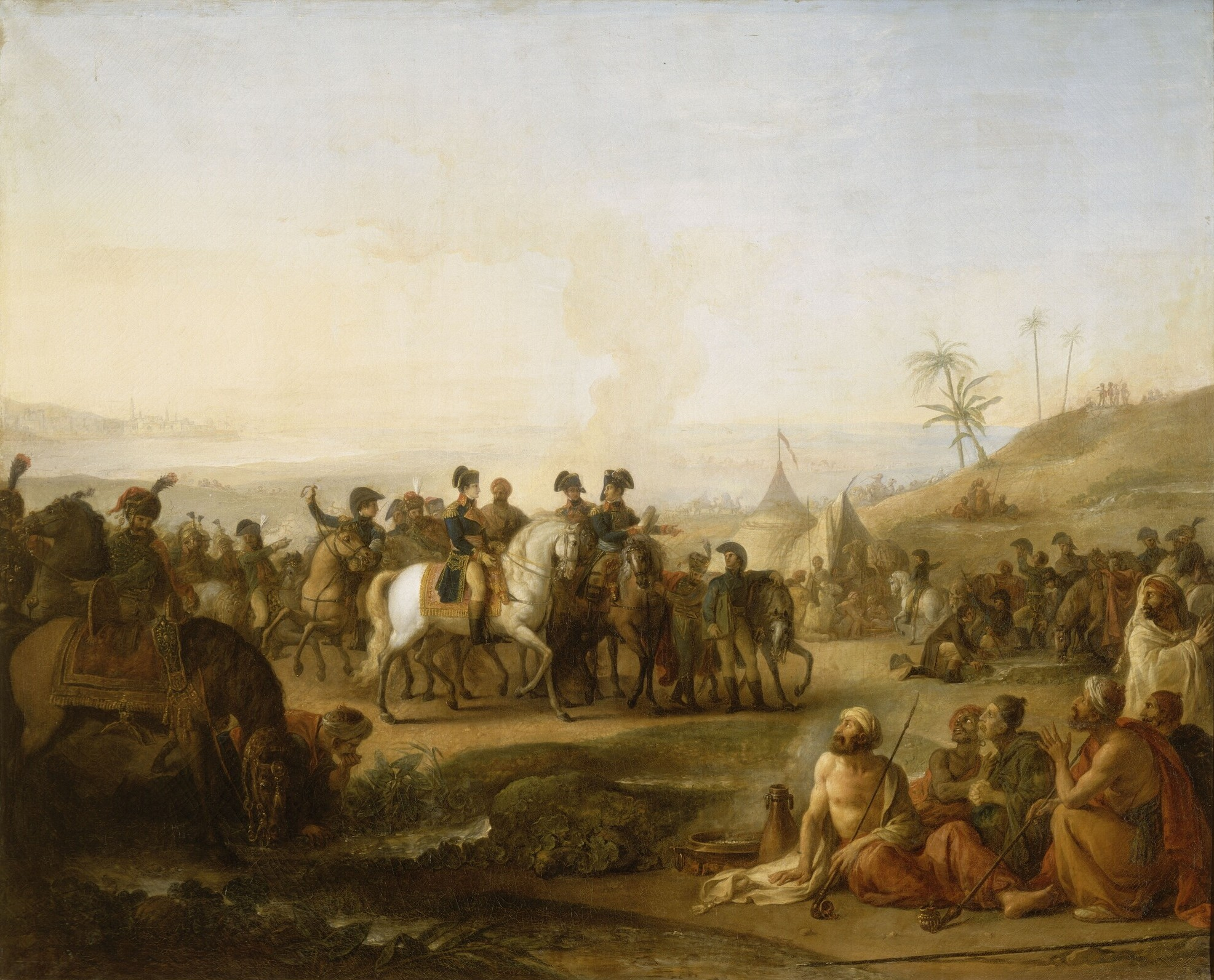 Bonaparte visitant les fontaines de Moïse en décembre 1798 lors de l'expédition d’Égypte (1798-1801).